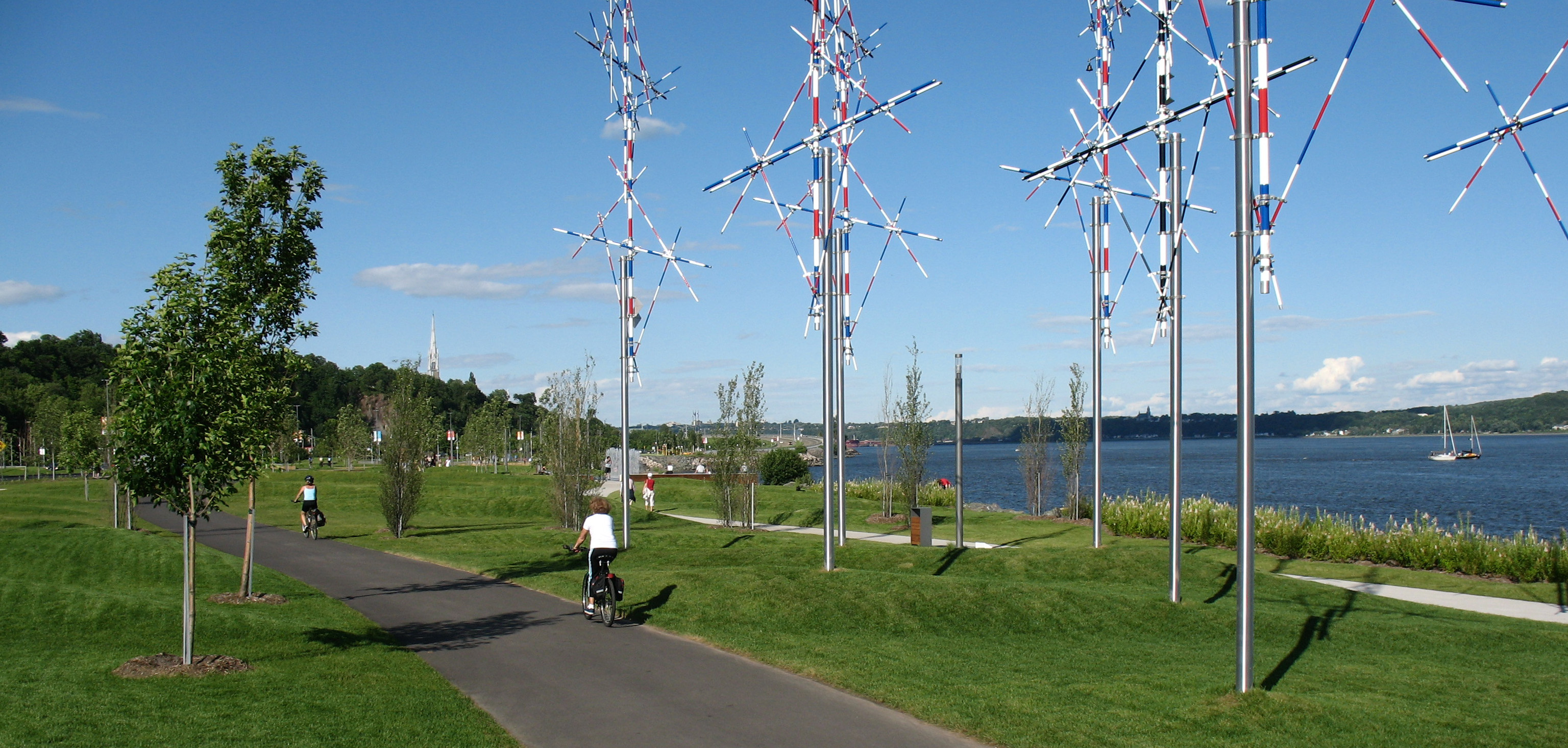 Promenade Samuel-De Champlain, station des Quais, Ville de Québec, province de Québec, Canada. Œuvre signalétique d'Yves Gendreau, Là où la terre fait danser les mâts, 2008